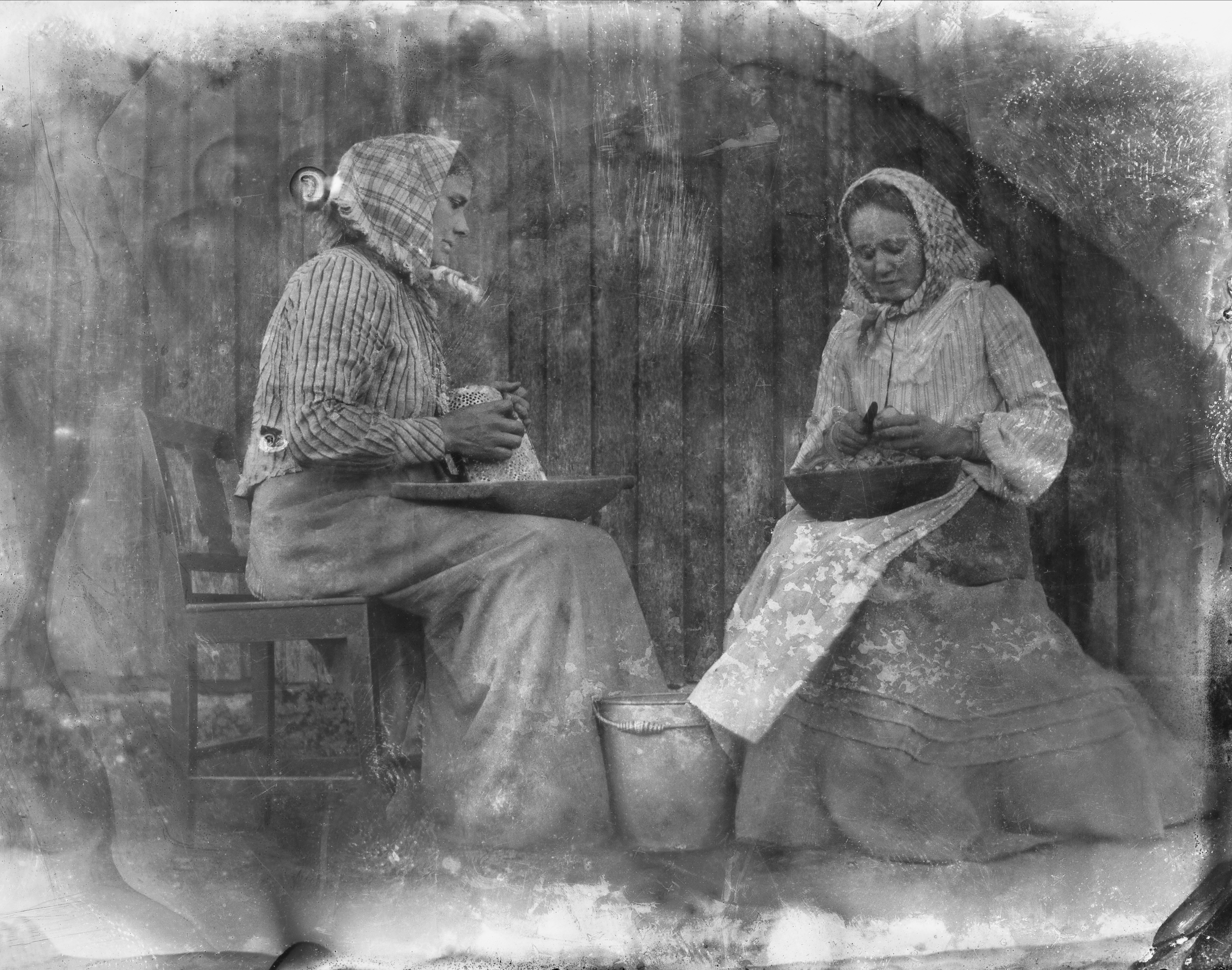 "Råskalning av potatis till pannkaka". Två kvinnor sitter och skalar potatis med hink mellan sig.